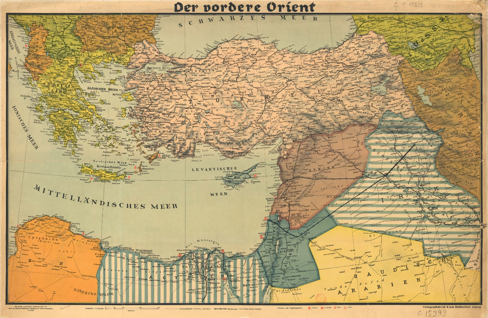 Der vordere Orient (Proche-Orient), 1941. List et von Bressensdorf (Leipzig), auteur du texte et éditeur.